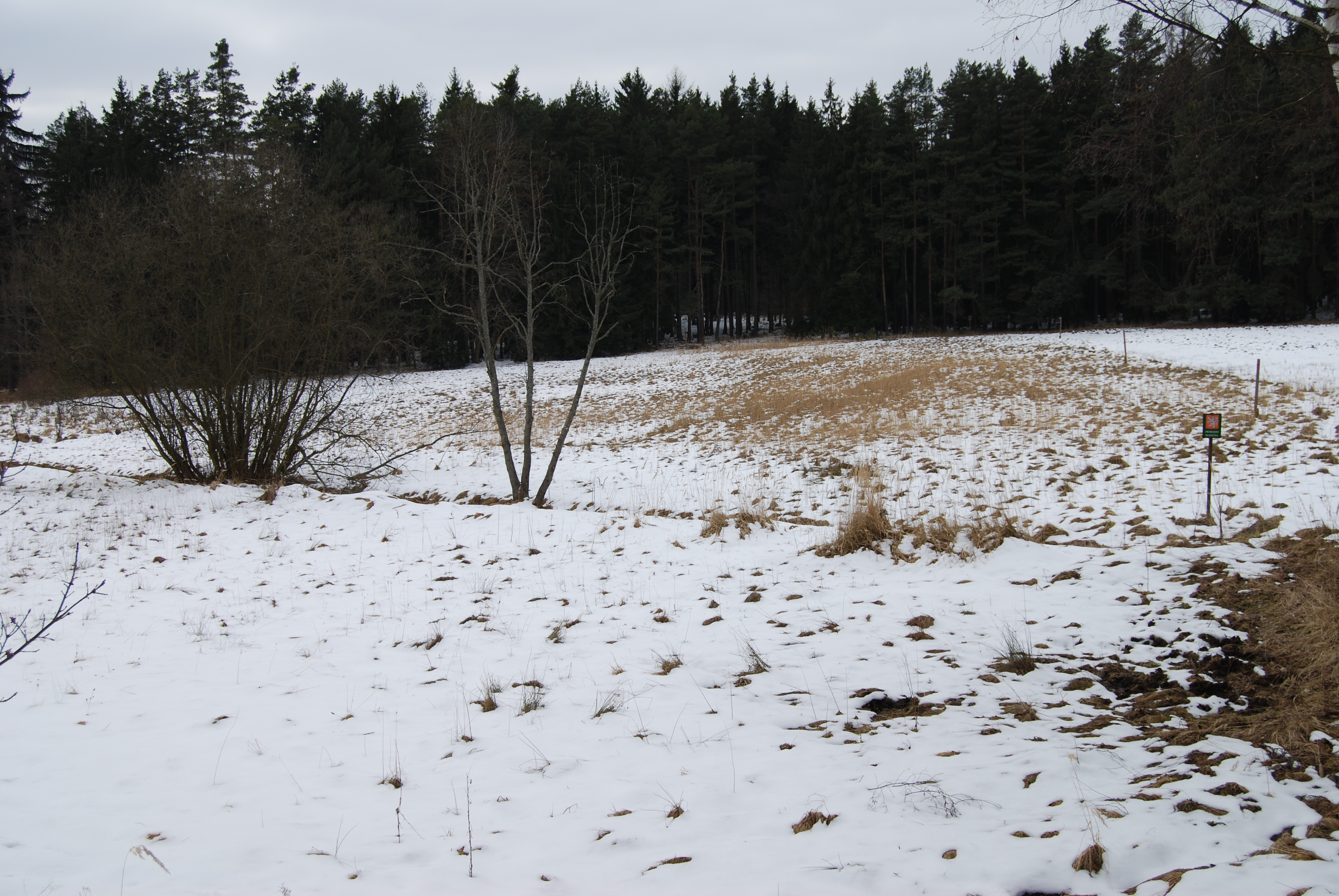 Přírodní památka Malý Kosatín ev. č. 982. Boudy. Okres Písek. Česká republika.